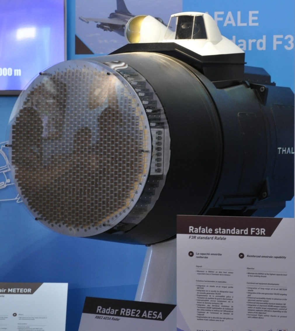 Maquette du radar Thales RBE2 AESA, exposée au stand du ministère de la Défense au salon du Bourget 2015, pour présenter le standard F3R de l'avion Dassault Rafale.